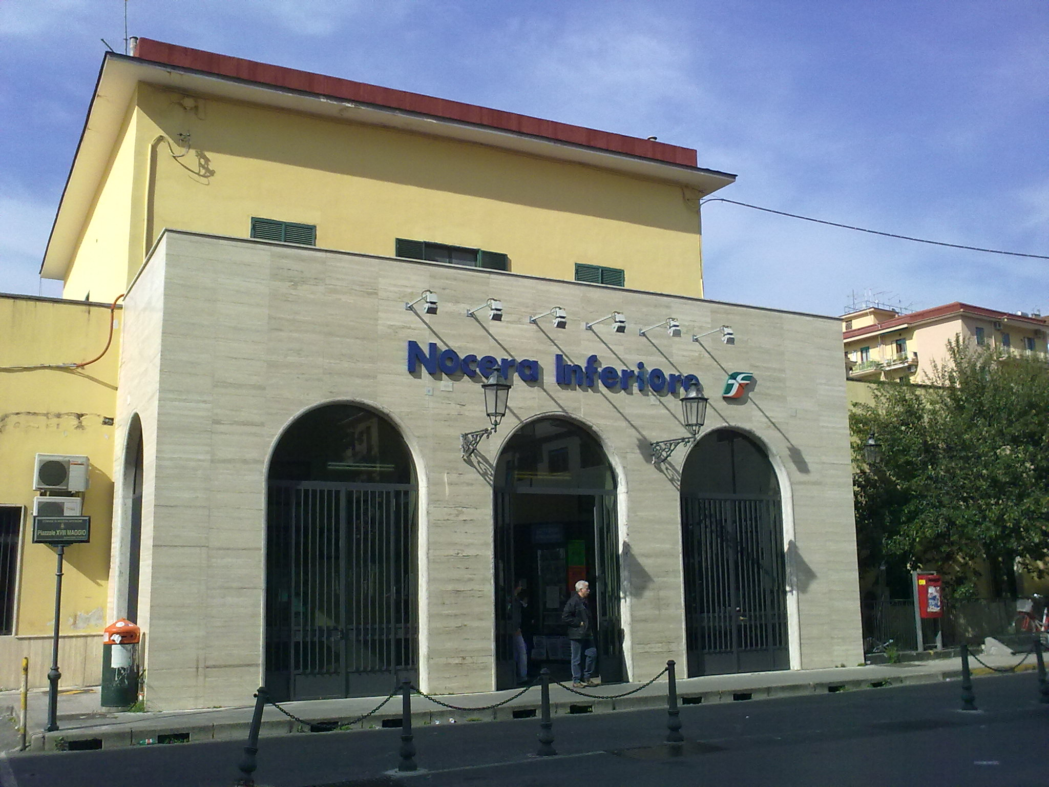 Stazione di Nocera Inferiore, piazza Trieste e Trento